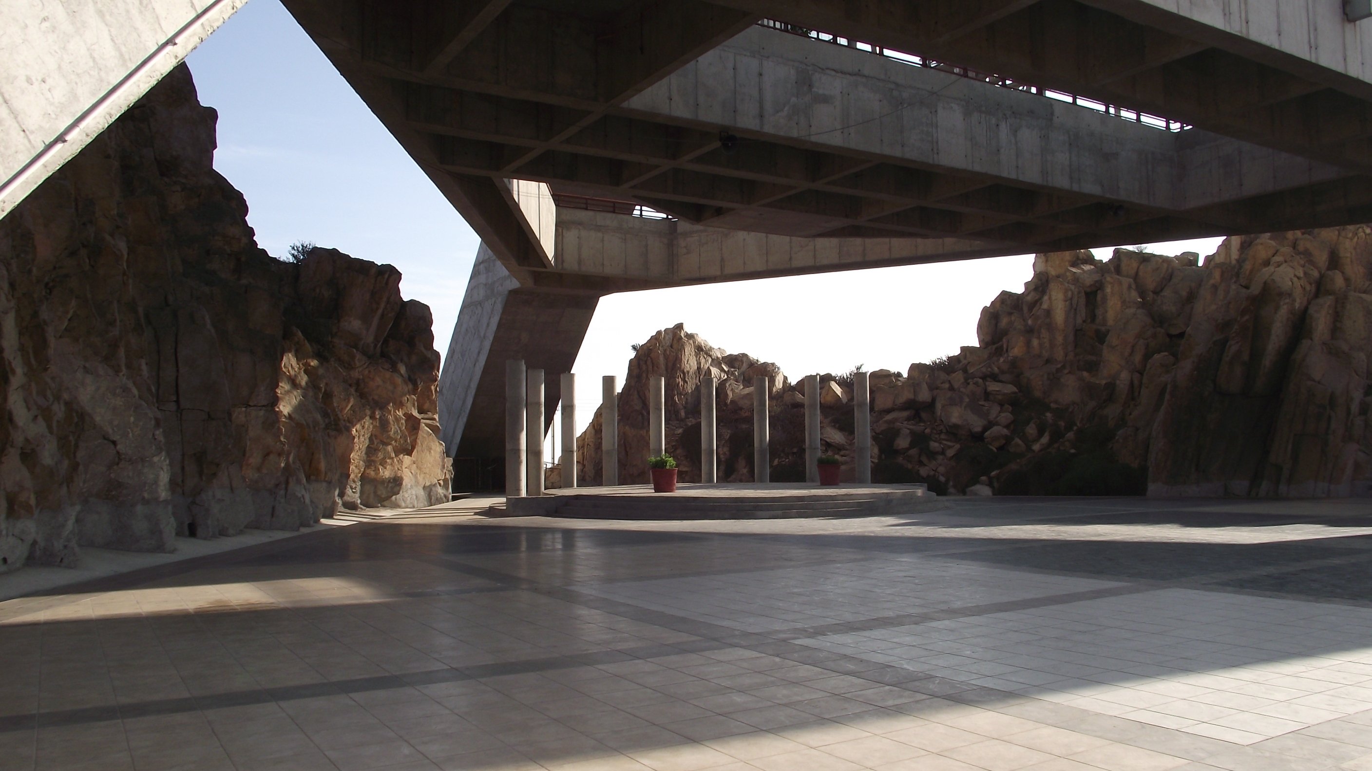 Plaza Cultural Arzobispo Bernardino Piñera Carvallo